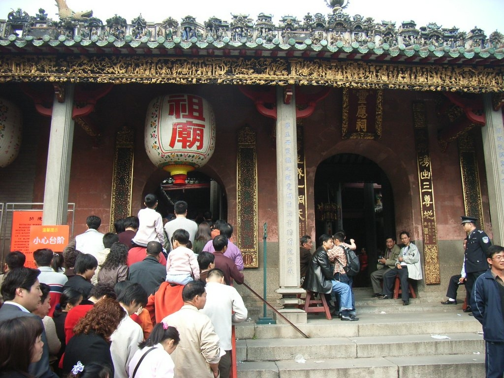 佛山祖廟建築群位於祖廟路二十一號佛山市博物館內，由祖廟、孔廟、碑廊、陳列館和園林組成，與黃飛鴻紀念館相通,占地 18600平方米，在1985年8月27日立之為全國重點文物保護單位